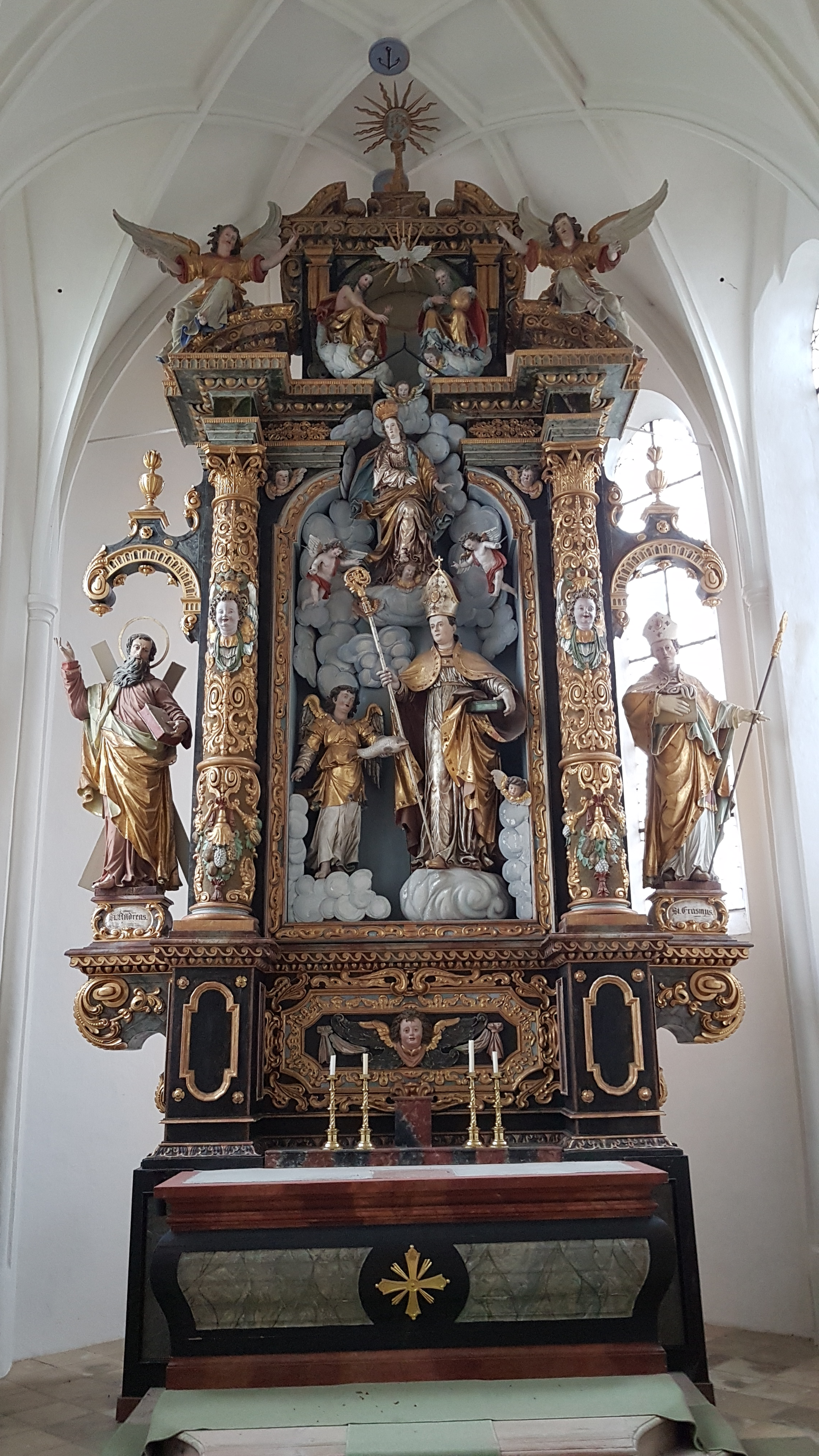 Mühldorf (Petershausen), Wallfahrtskirche St. Ulrich, den am Übergang vom Früh- zum Hochbarock stehenden Hochaltar schuf 1656/58 der Münchener Hofbildhauer Constantin Pader.